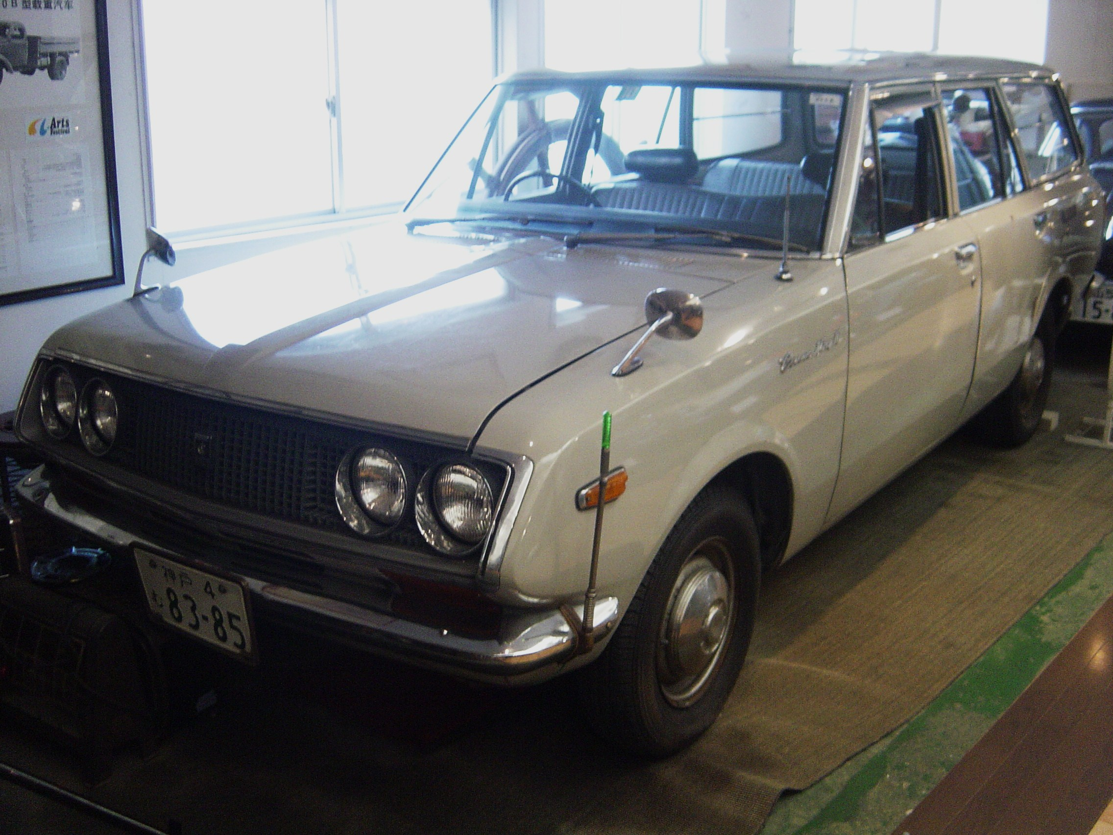 TOYOTA CORONA MARK2(トヨタ・マークII),Fukuyama MOTOR and CLOCK MUSEUM